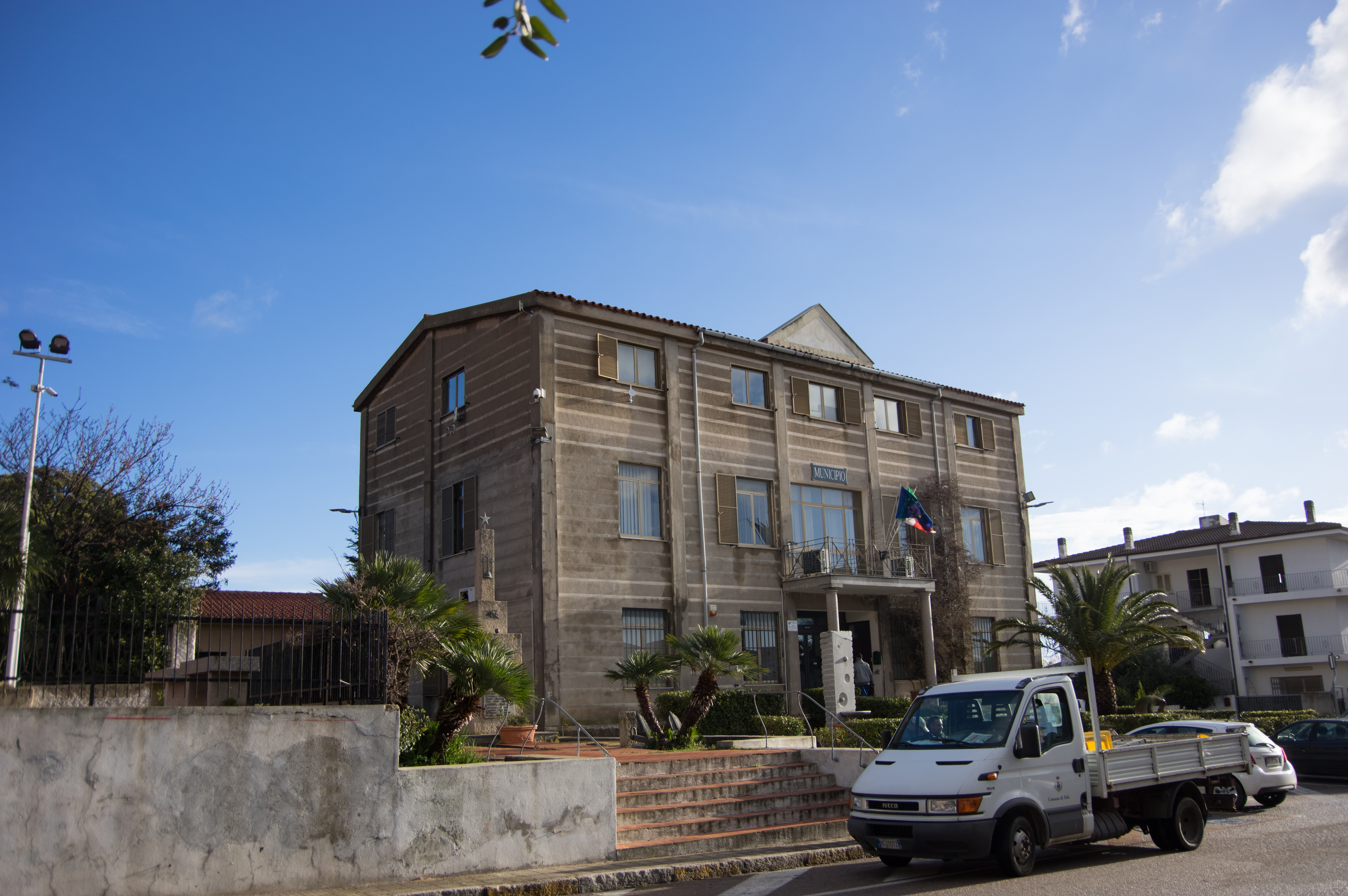 Telti in Sardinien. Die Gemeindeverwaltung.